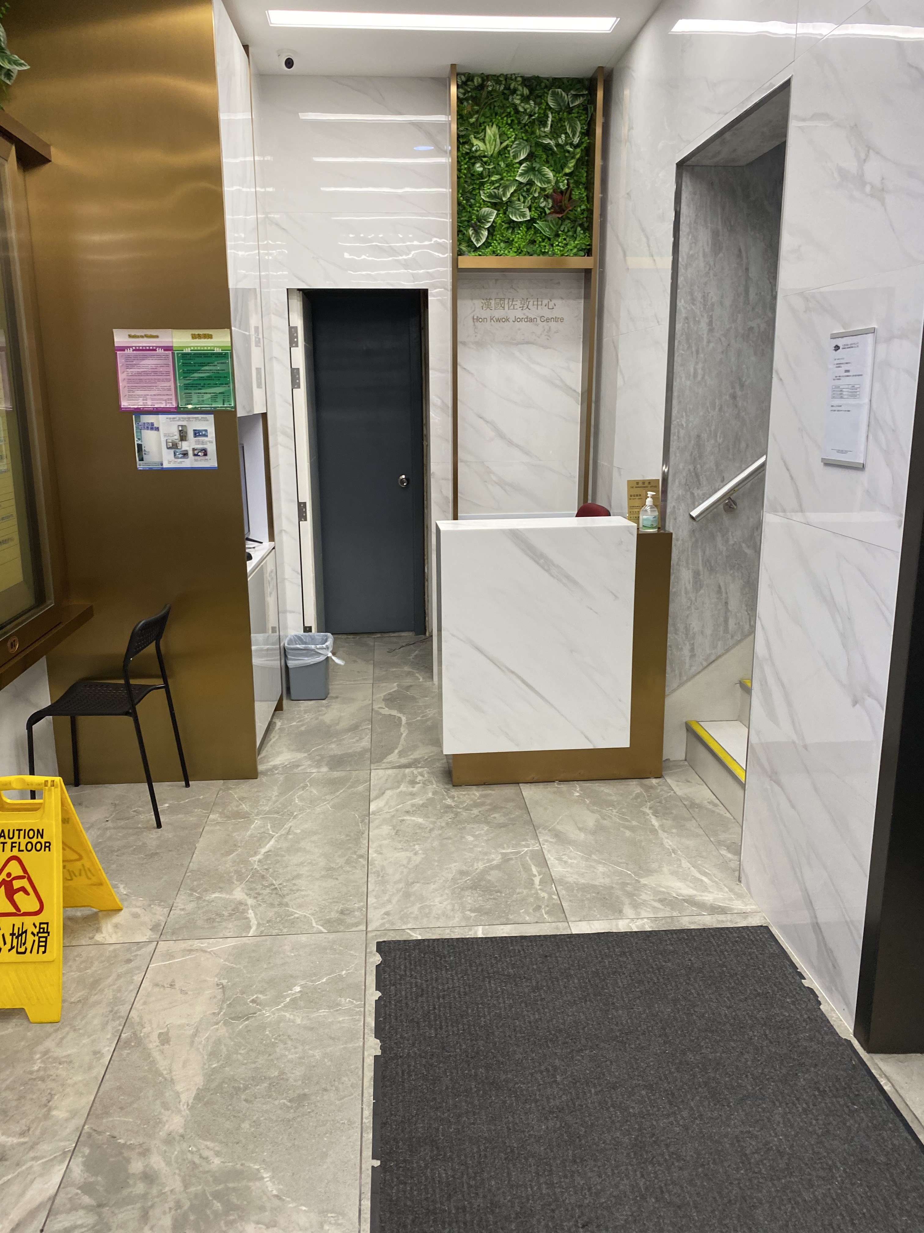 中文（香港）: 漢國佐敦中心大堂(2020年6月)